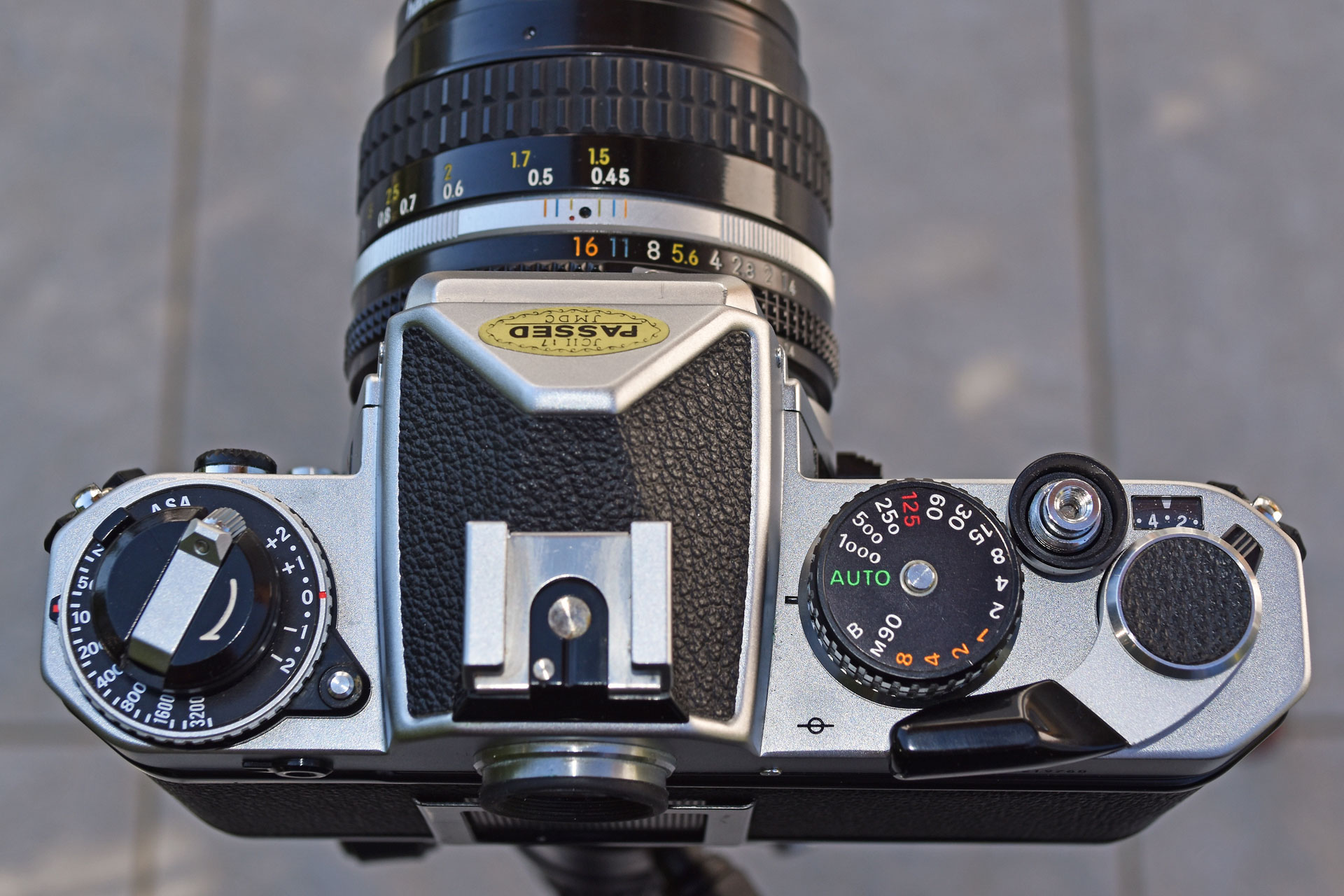 Oberseite Nikon FE